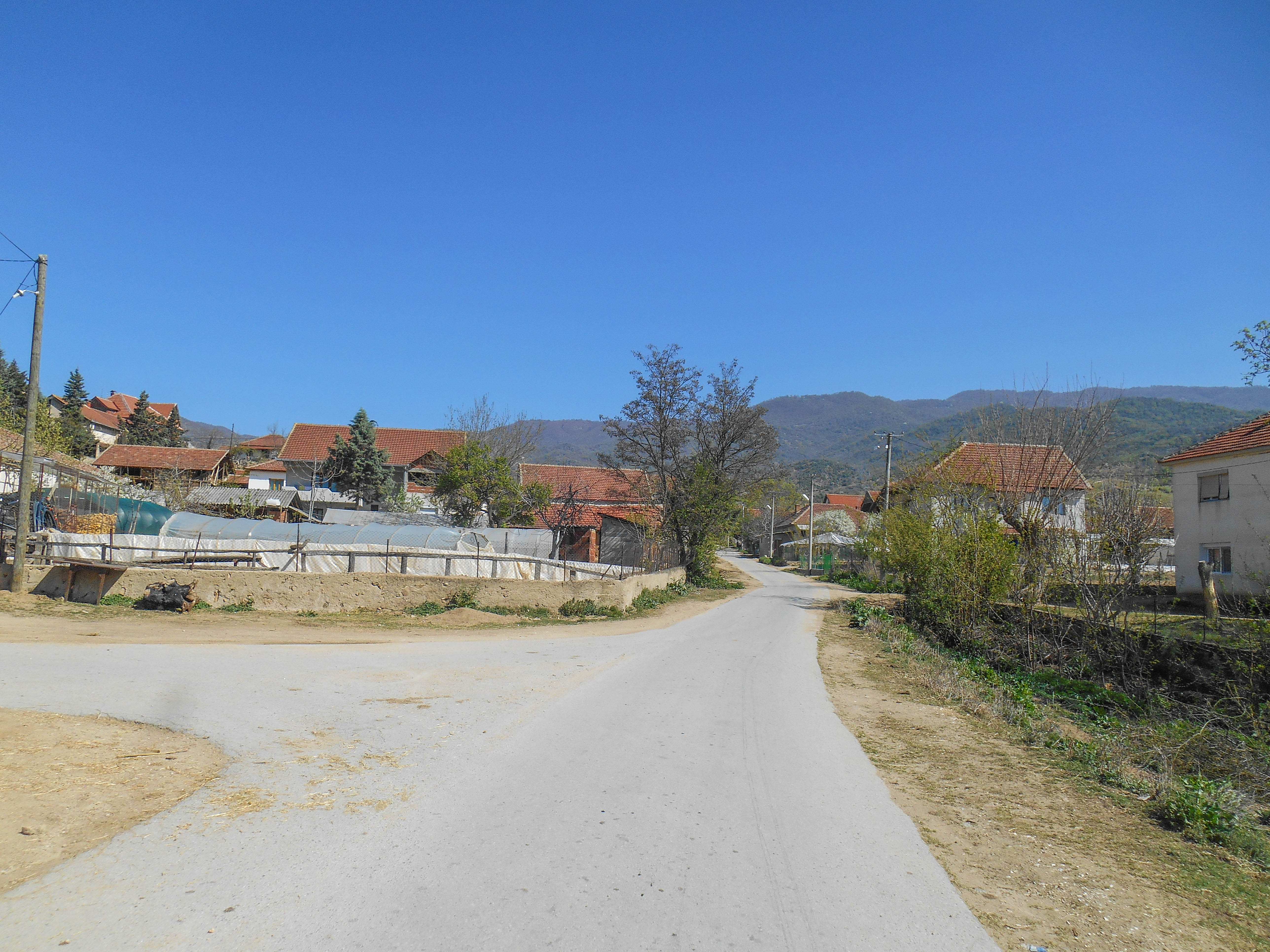 Дрвош